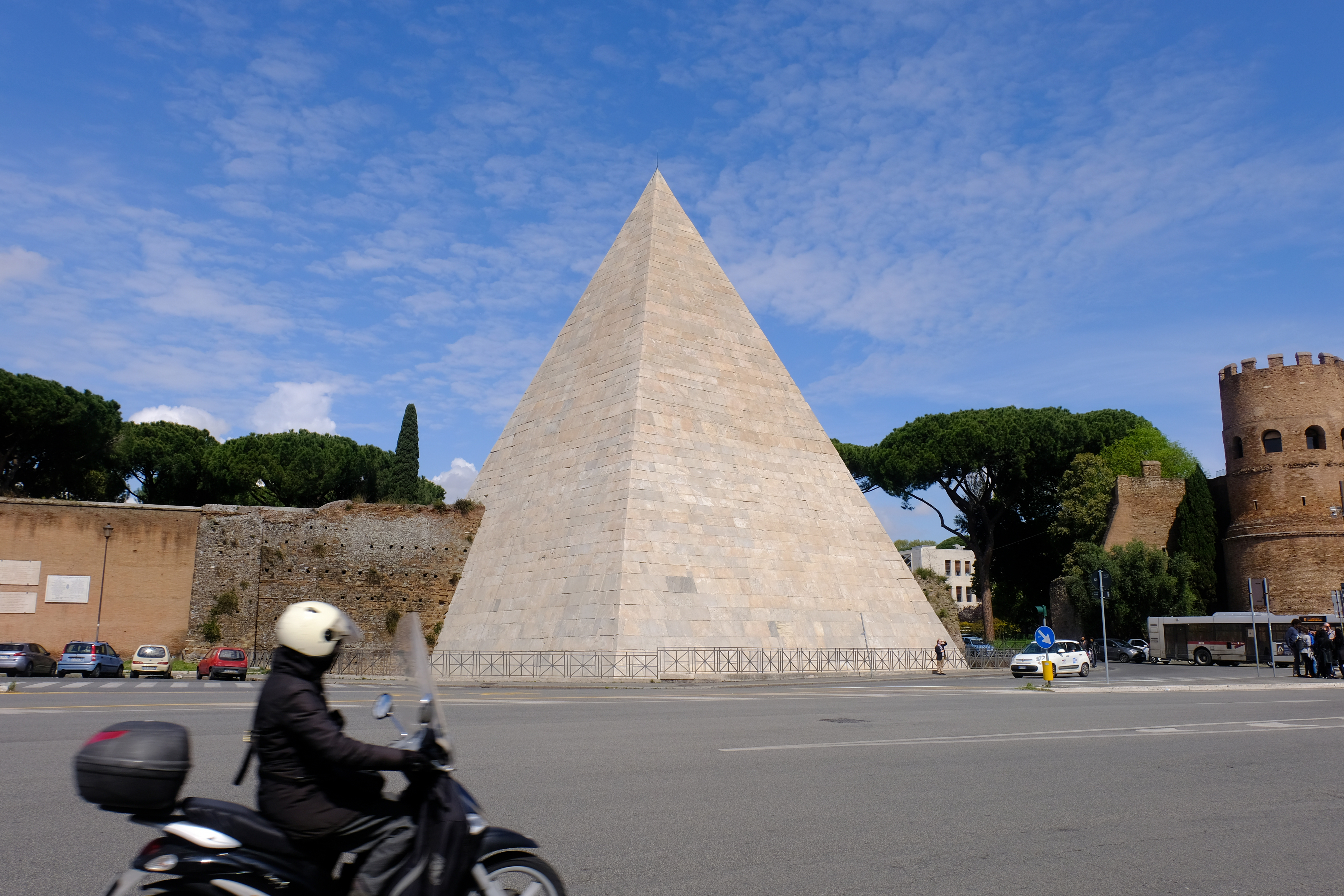 The Pyramid of Cestius in Rome (2019)